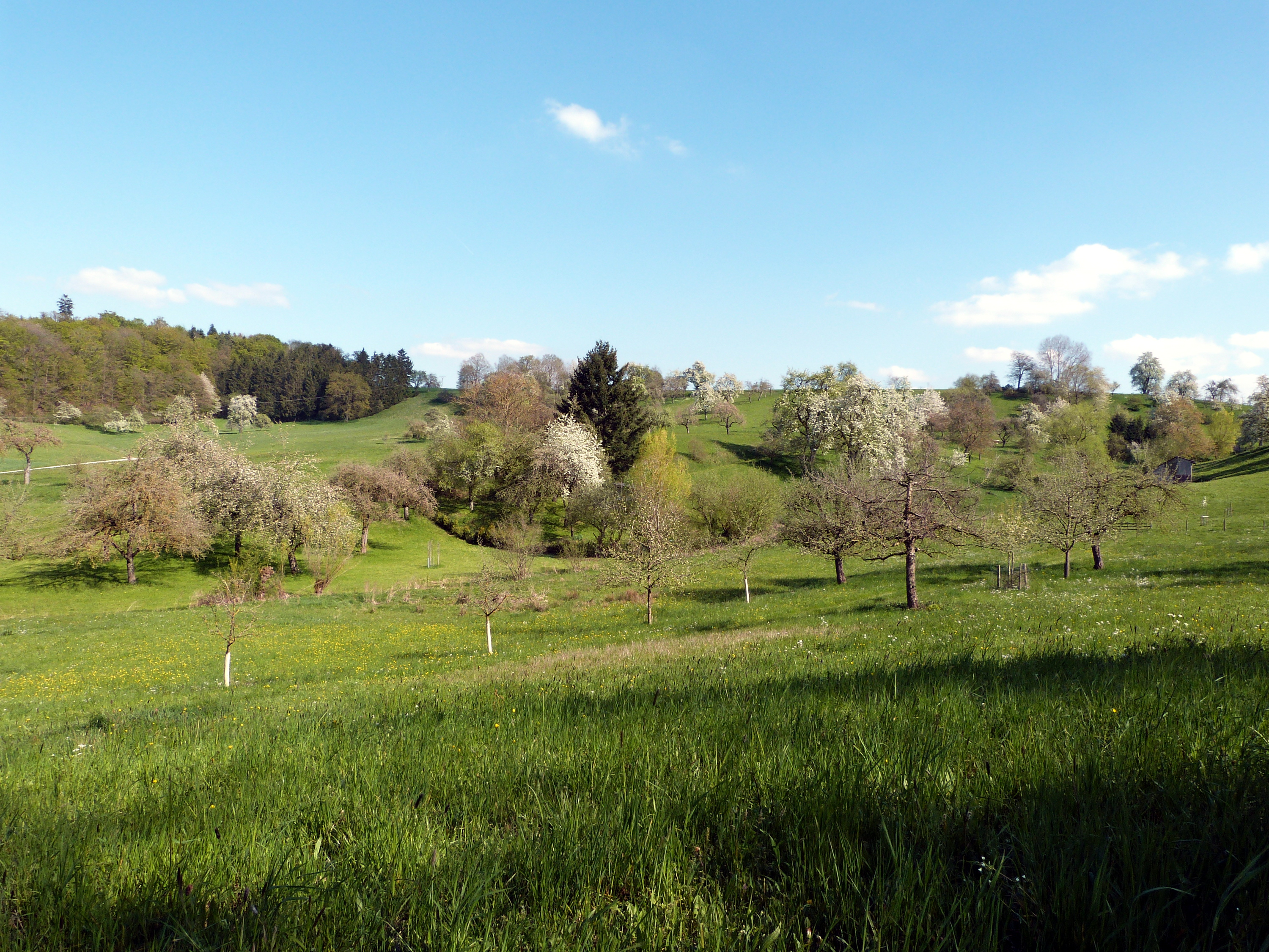 Streuobstwiese an der Verbindungsstraße von Stimpfach nach Hörbühl; ist sowohl Teilfläche des FFH-Gebiets "Crailsheimer Hart und Reusenberg" als auch Teil des Landschaftsschutzgebiets "Jagsttal ..."